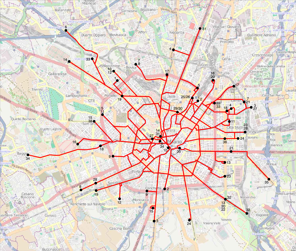 Mappa della rete tranviaria urbana di Milano nel 1948.